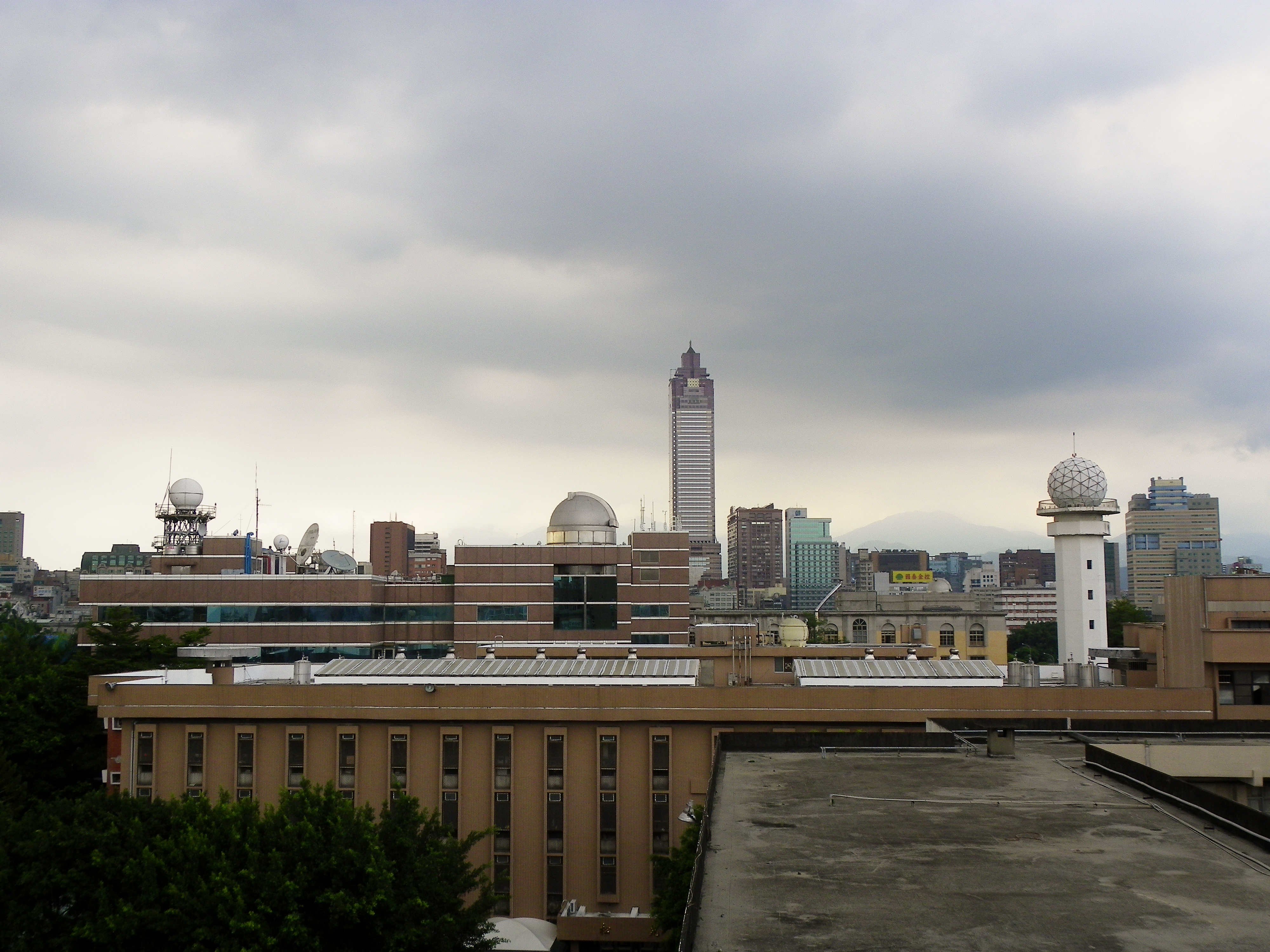 由臺北市立教育大學公誠樓北望中央氣象局屋頂。